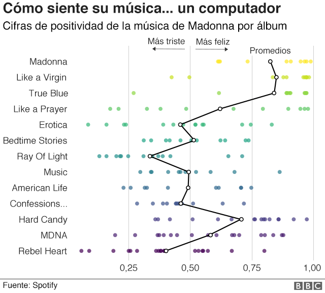 "Cifras de positividad de la música de Madonna por álbum" en Spotify